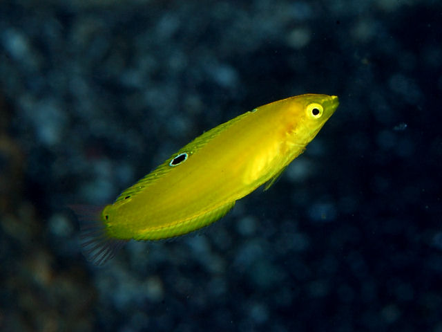 コガネキュウセン Halichoeres chrysus